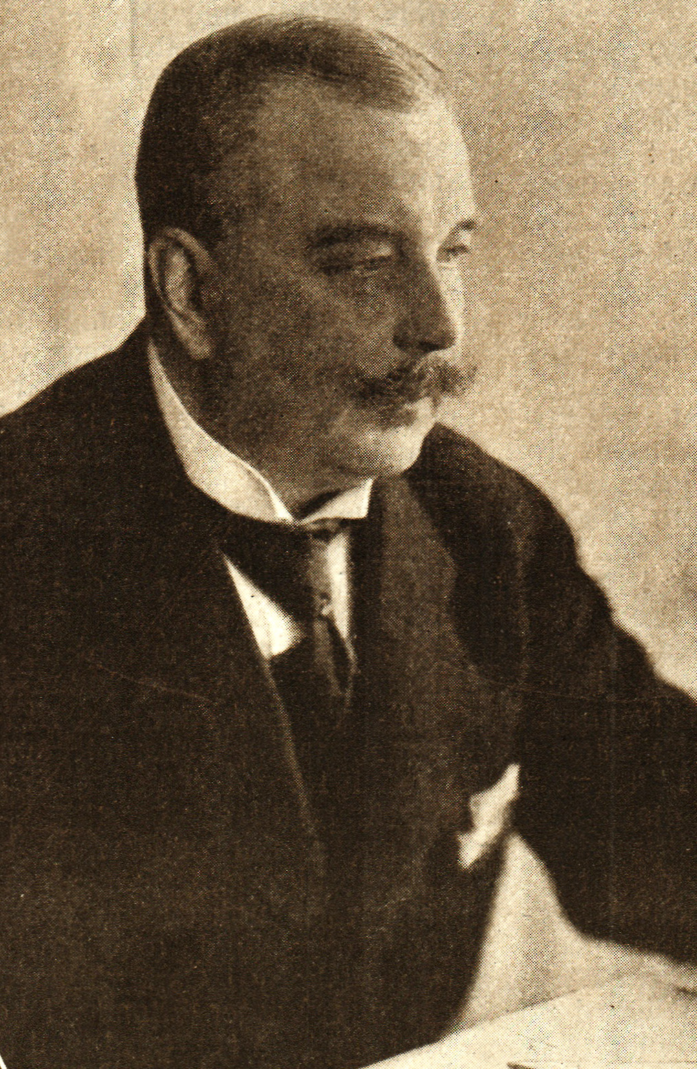 Axel Ekman (1869-1939)